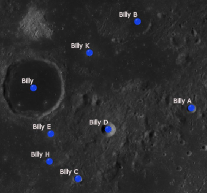 Cráter lunar Billy. Cráteres satélite. (Imagen LRO)